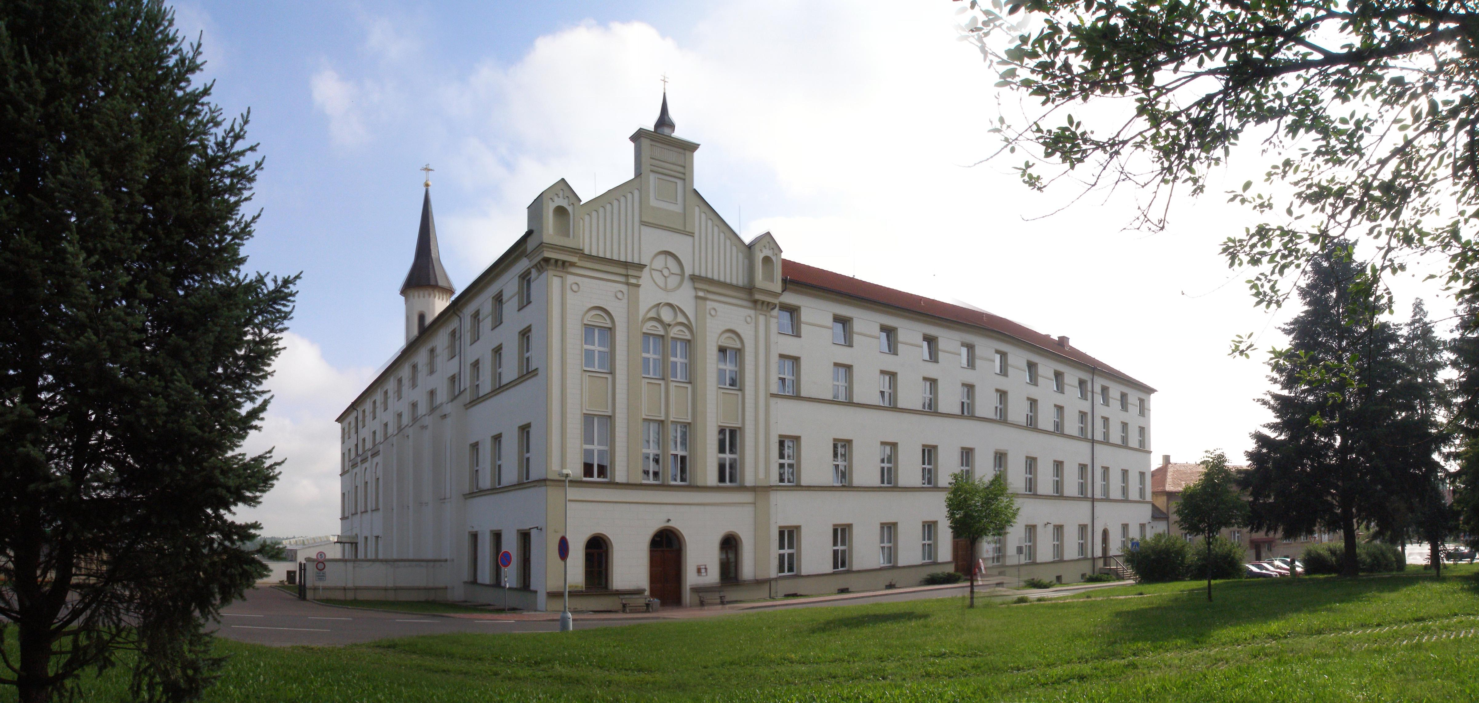 Česky: klášter Praha Řepy